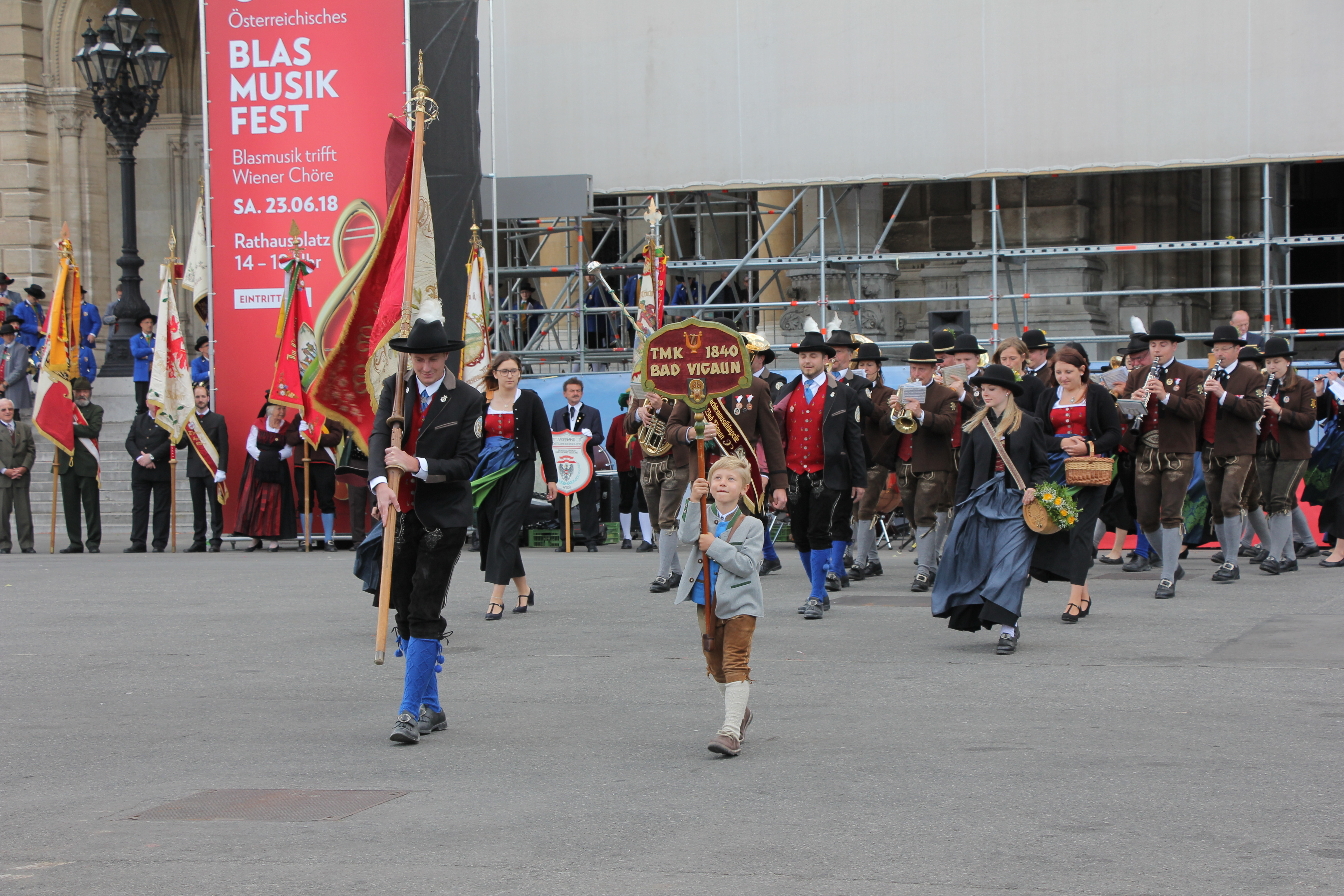 Impressionen von Österreichischen Blasmusikfest 2018 am Wiener Rathausplatz